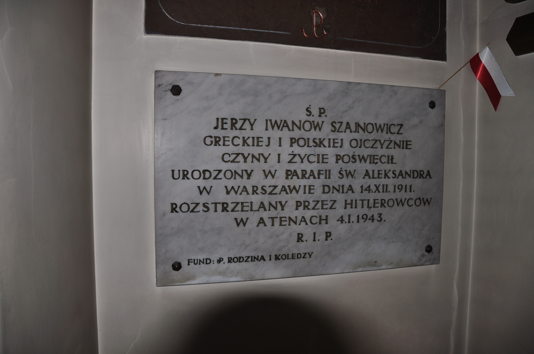 Warszawa pl. Trzech Krzyży. Kościół św. Aleksandra. Tablica Jerzy Iwanow Szajnowicz.